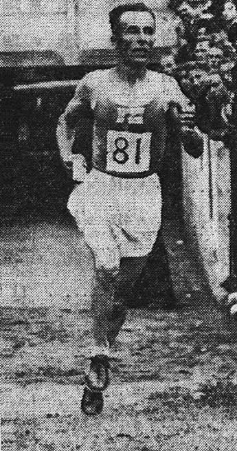 Le finlandais Väinö Muinonen, vainqueur du marathon des championnats d'Europe 1938, à son entrée dans le stade de Colombes